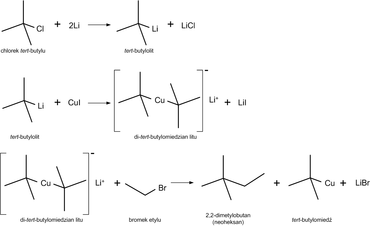 Przykład syntezy Coreya-House'a - synteza neoheksanu